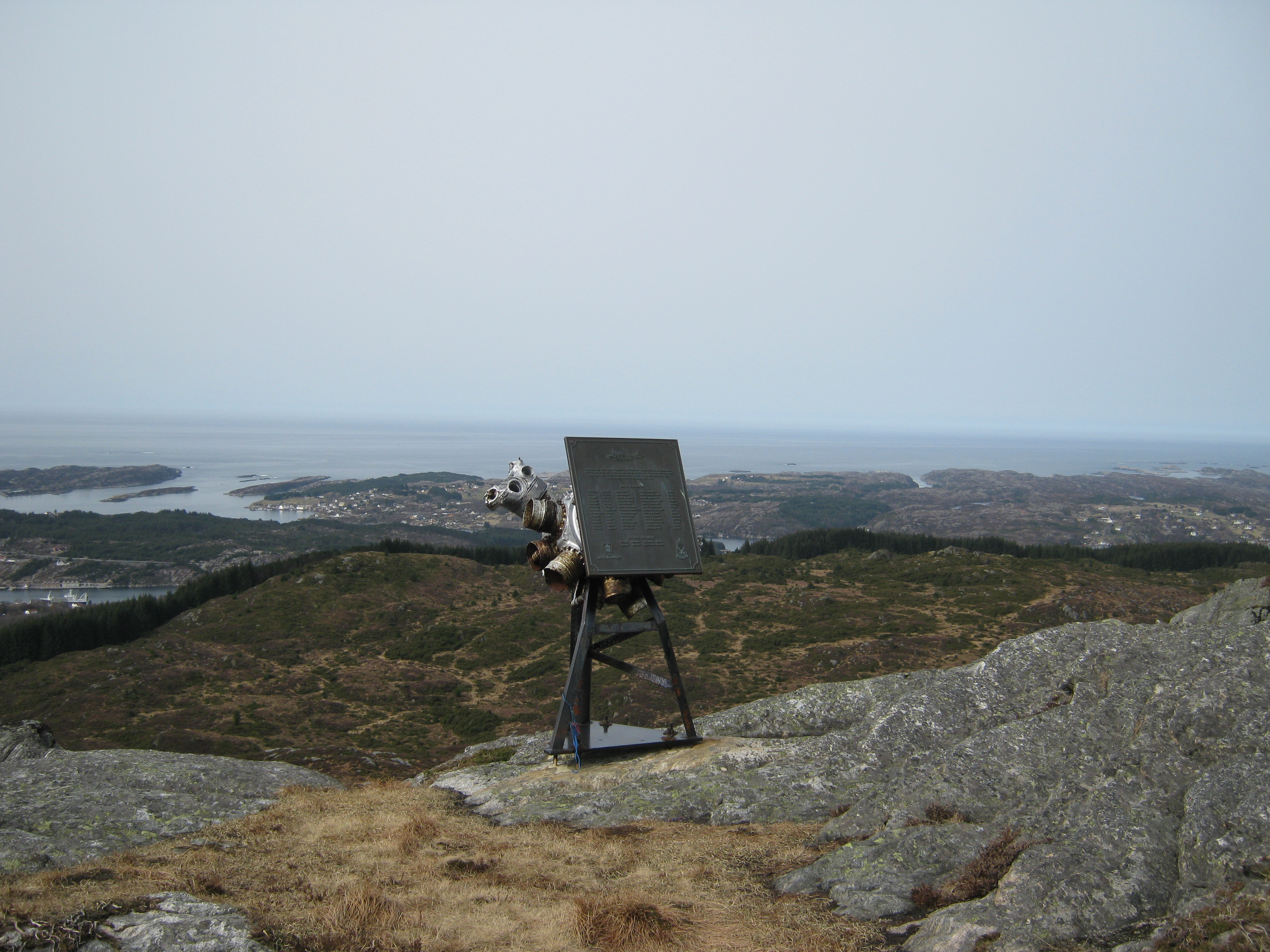 Minnesmerke etter flystyrten på Førdesveten.